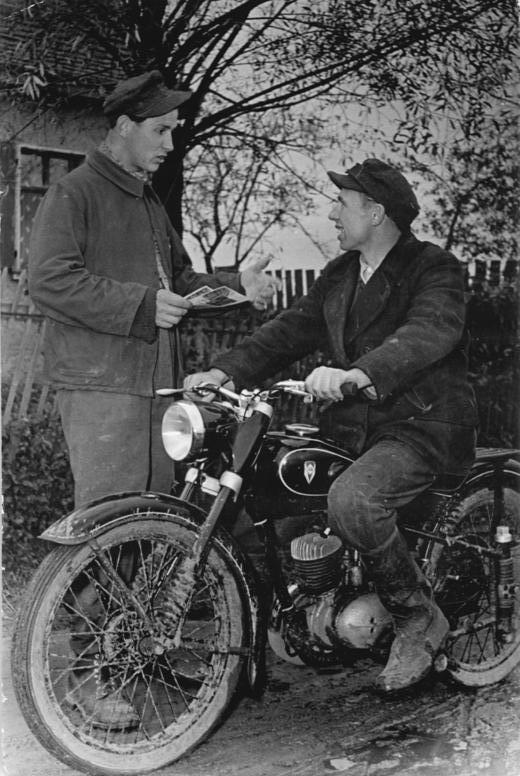 Schenkenberg, LPG-Mitglied auf Motorrad Zentralbild Illner 21.10.1952 Zum Monat der deutsch-sowjetischen Freundschaft. Produktionsgenossenschaft "7. Oktober" ruft zum Wettbewerb auf. Die Produktionsgenossenschaft "7.Oktober" in Schenkenberg, Krs. Delitzsch, Bezirk Leipzig hat alle landwirtschaftlichen Produktionsgenossenschaften zu Ehren des Monats der deutsch-sowjetischen Freundschaft zum Wettbewerb aufgerufen. Ziele des Wettbewerbs sind: Gründung einer Betriebsgruppe der Gesellschaft für deutsch-sowjetische Freundschaft und Mitgliederwerbung unter den Genossenschaftsbauern. Höhepunkt und Abschluss des Wettbewerbs soll eine Kulturveranstaltung, die Industriearbeiter und Genossenschaftsauern vereinen wird. UBz: Vom VdgB wurde am Jahrestag der Gründung der DDR der Produktions-Genossenschaft zur Unterstützung der Arbeit ein Motorrad [IFA RT 125] übergeben, das jetzt Helmut Merke, der Vorsitzende der Produktions-Genossenschaft fährt, der sich besonders um die Durchführung des Wettbewerbs kümmert und hier vom Neubauern Kurt Stolle die Anmeldung als Mitglied der Gesellschaft für deutsch-sowjetische Freundschaft entgegen nimmt. Kurt Stolle ist 21 Jahre alt und wurde als bester Genossenschaftsbauer ausgezeichnet.